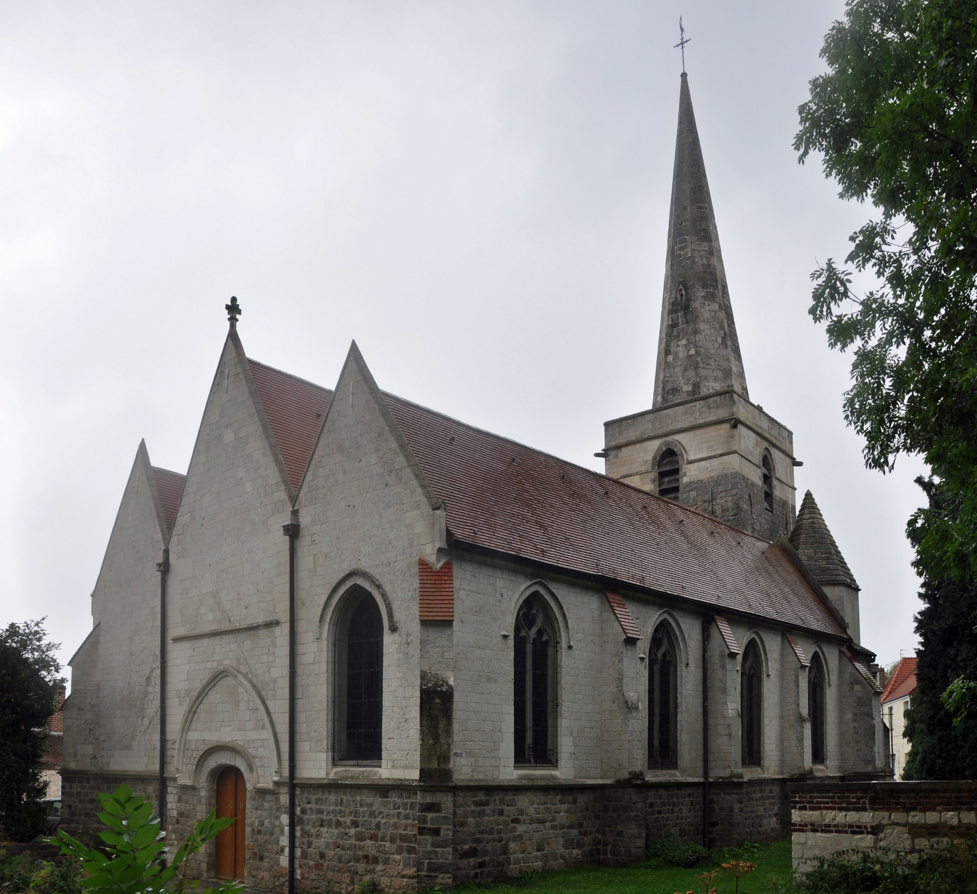 Église Saint-Martin de Bruay-la-Buissière, 206 rue des Charitables (Inscrit, 2000) .